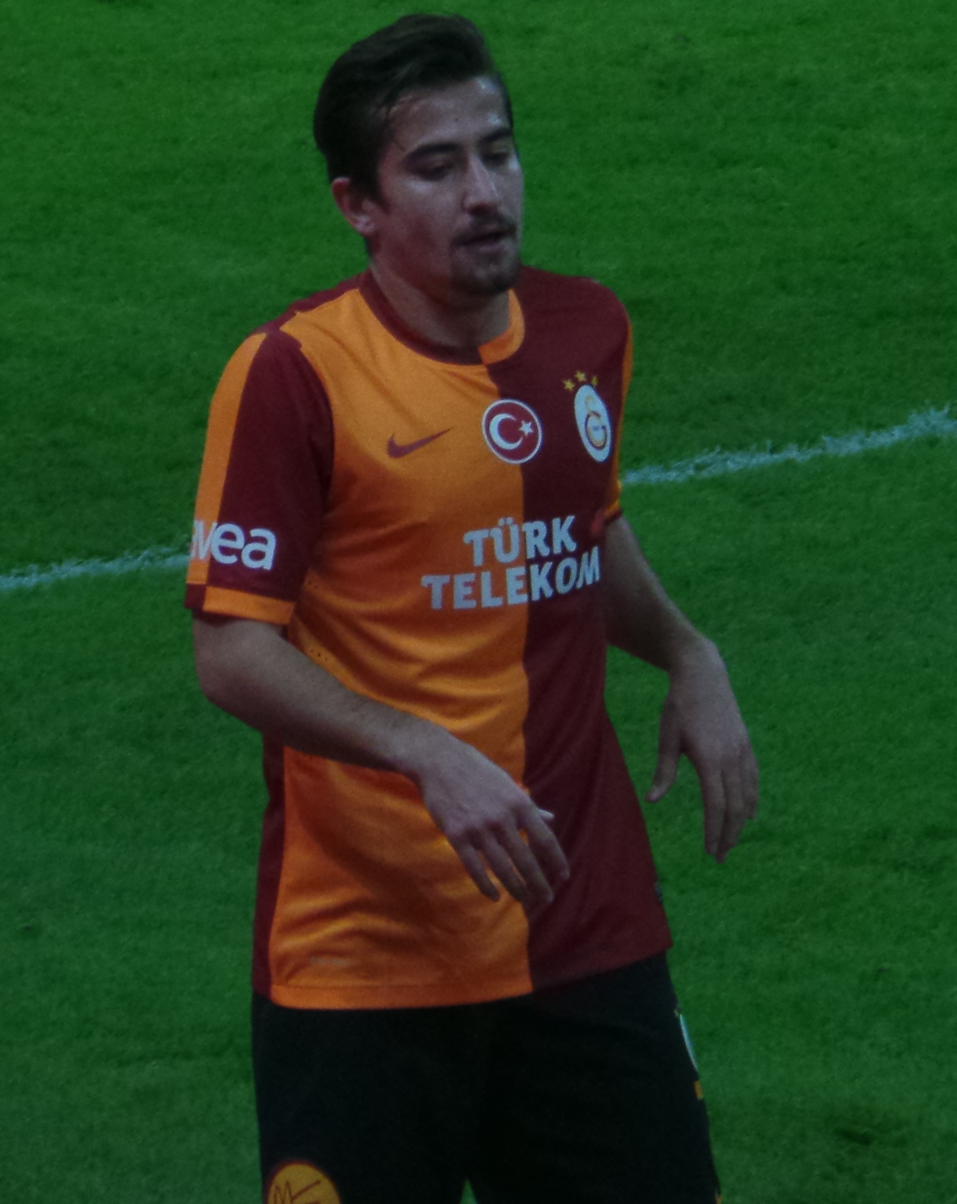 Aydın Yılmaz Tokatspor match